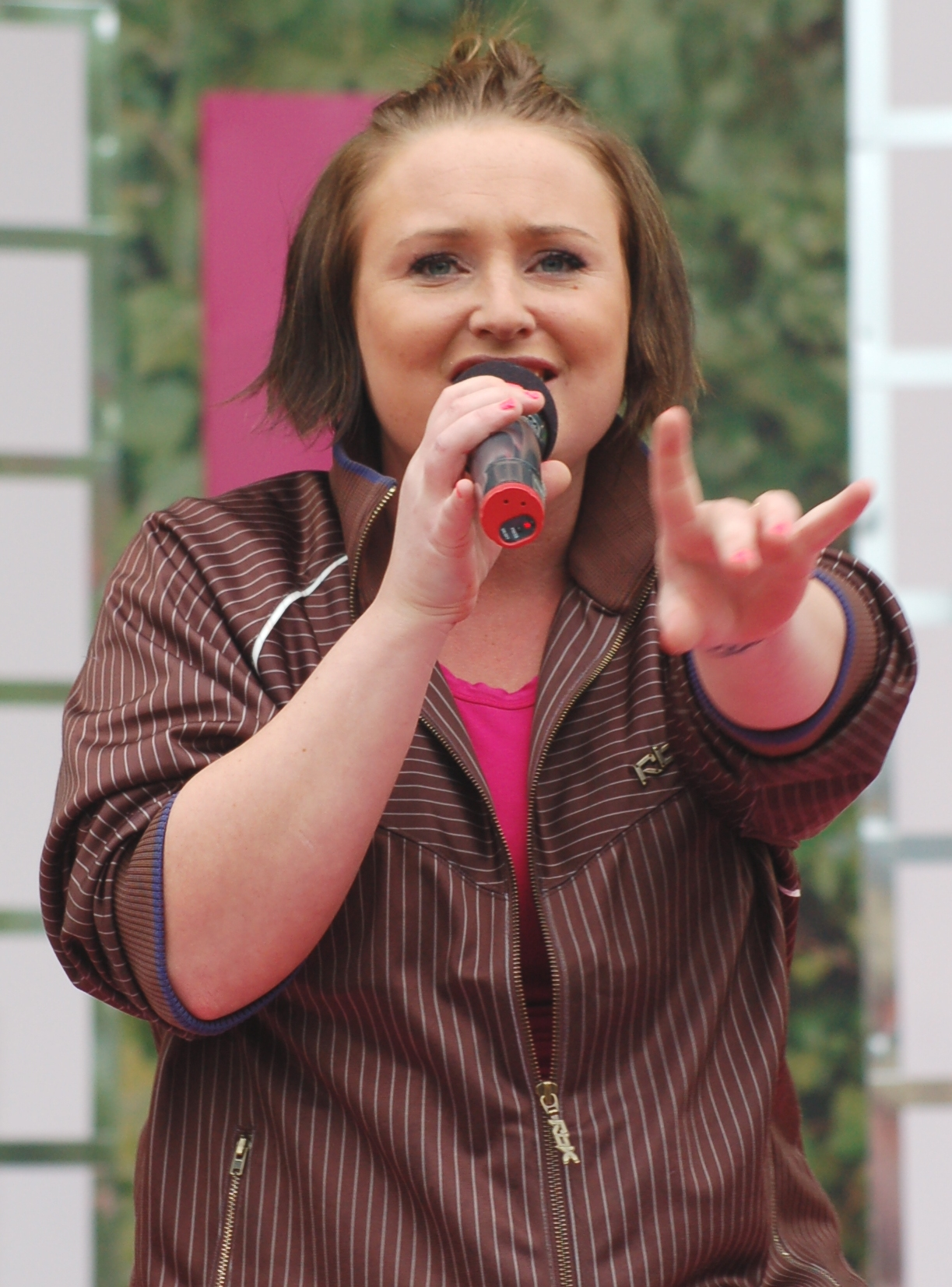 Frida Muranius Sjunger I Stockholm På Gröna Lund, Sommarkrysset